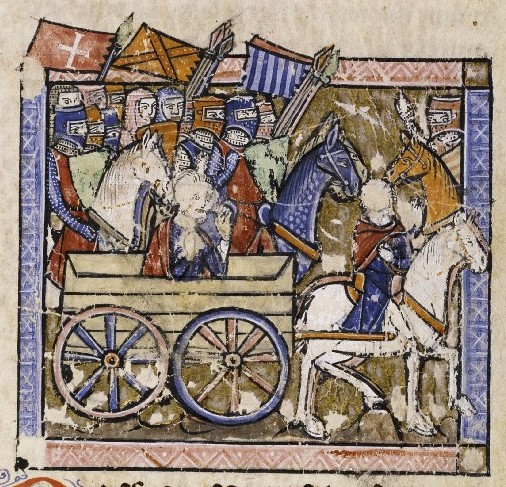 Jocelin Ier malade